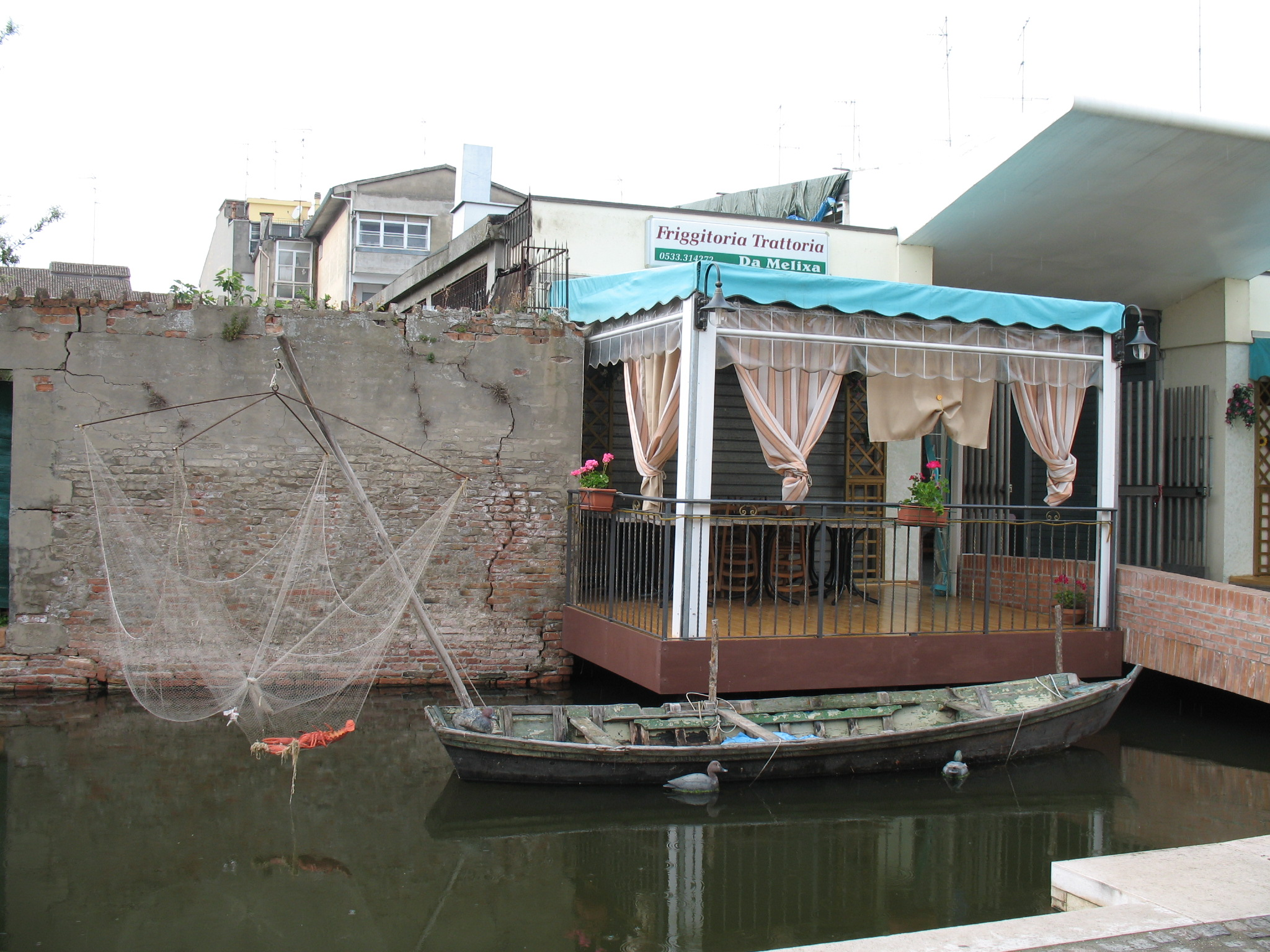 Comacchio, Emilia Romagna, Italia angolo pittoresco